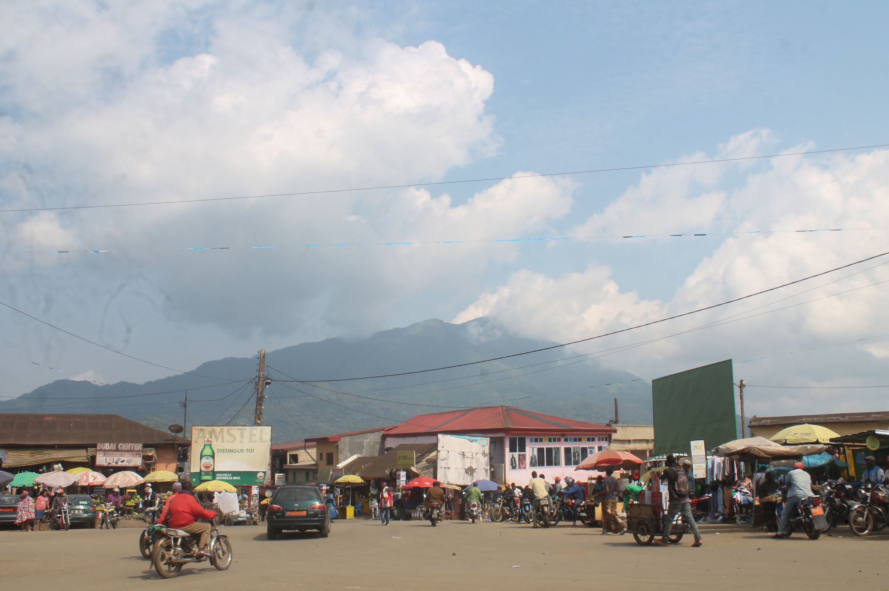 vue du mont Manégoumba a partir du marché central